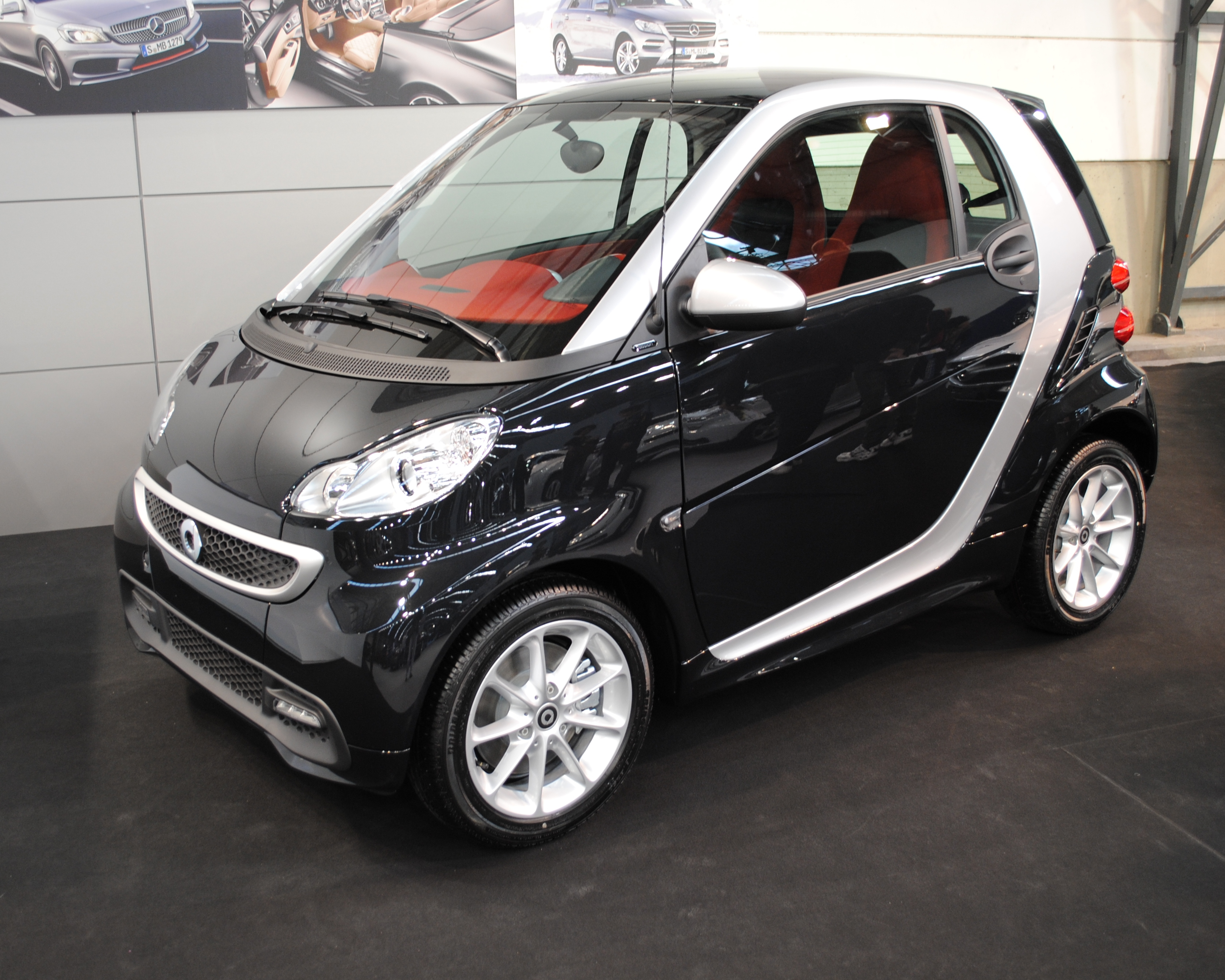 SMART MHD, 2012, IFEVI